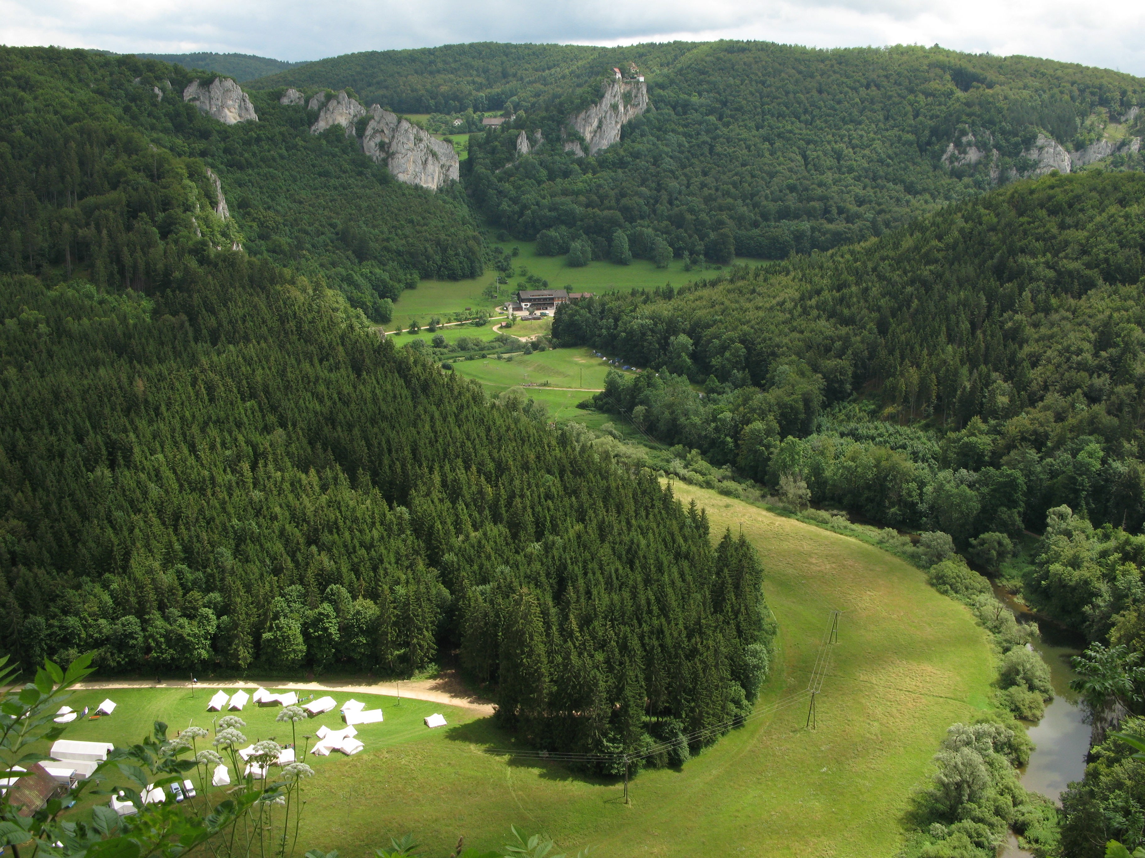 Die Donau, Schloss Bronnen und das Jägerhaus gesehen von den Knopfmacherfelsen am Donauberglandweg auf der Schwäbischen Alb. Geologie: Die hinten sichtbare, zweiteilige Felsformation ist Teil einer ausgeräumten Zementmergelschüssel (Formationen aus Jurameer-Zeit, ~150 Mio Jahre). Eine spät-miozän/pliozäne, schnell und kräftig eingetiefte Urdonau hat den Rand der Zementmergelschüssel an- und aufgeschnittenen.